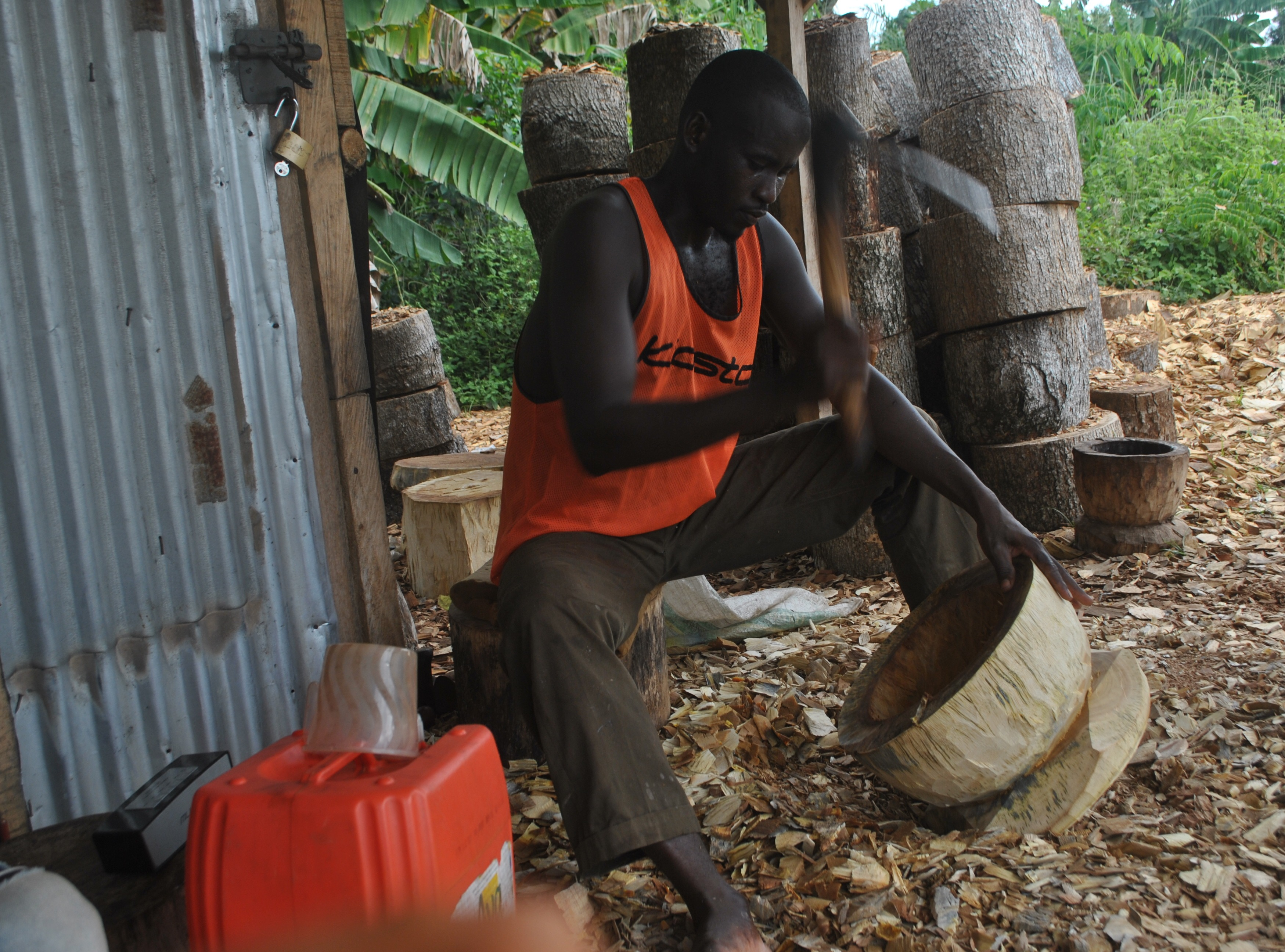 Un fabricant de mortier en pleine journée de travail à Toumodi, une ville située au Centre de la Côte d'Ivoire. La ville est à environ 201 km d'Abidjan, la capitale économique ivoirienne.